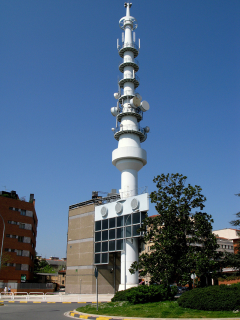 Photo: B. García S.